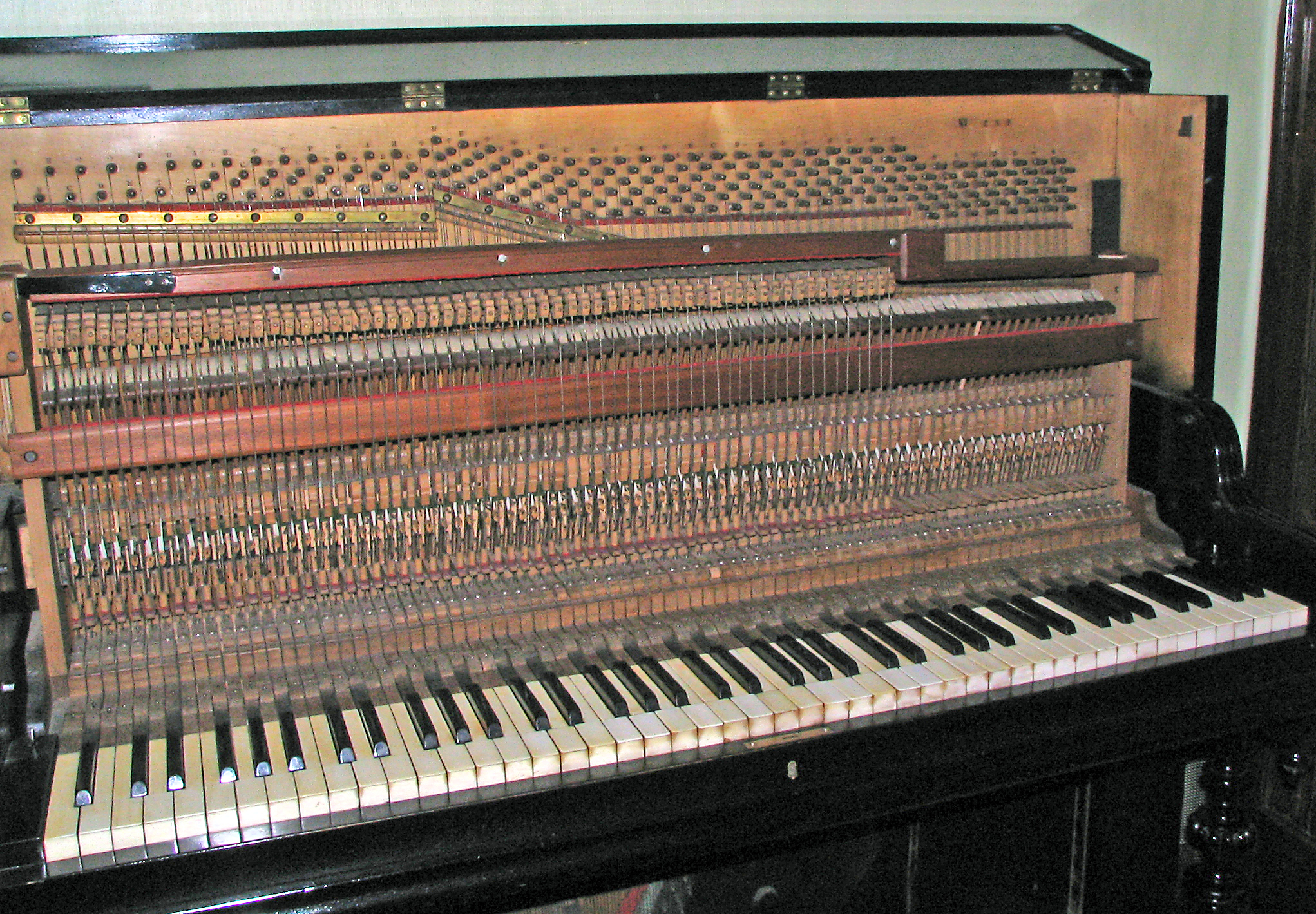 Pianino - mechanizm górnotłumikowy